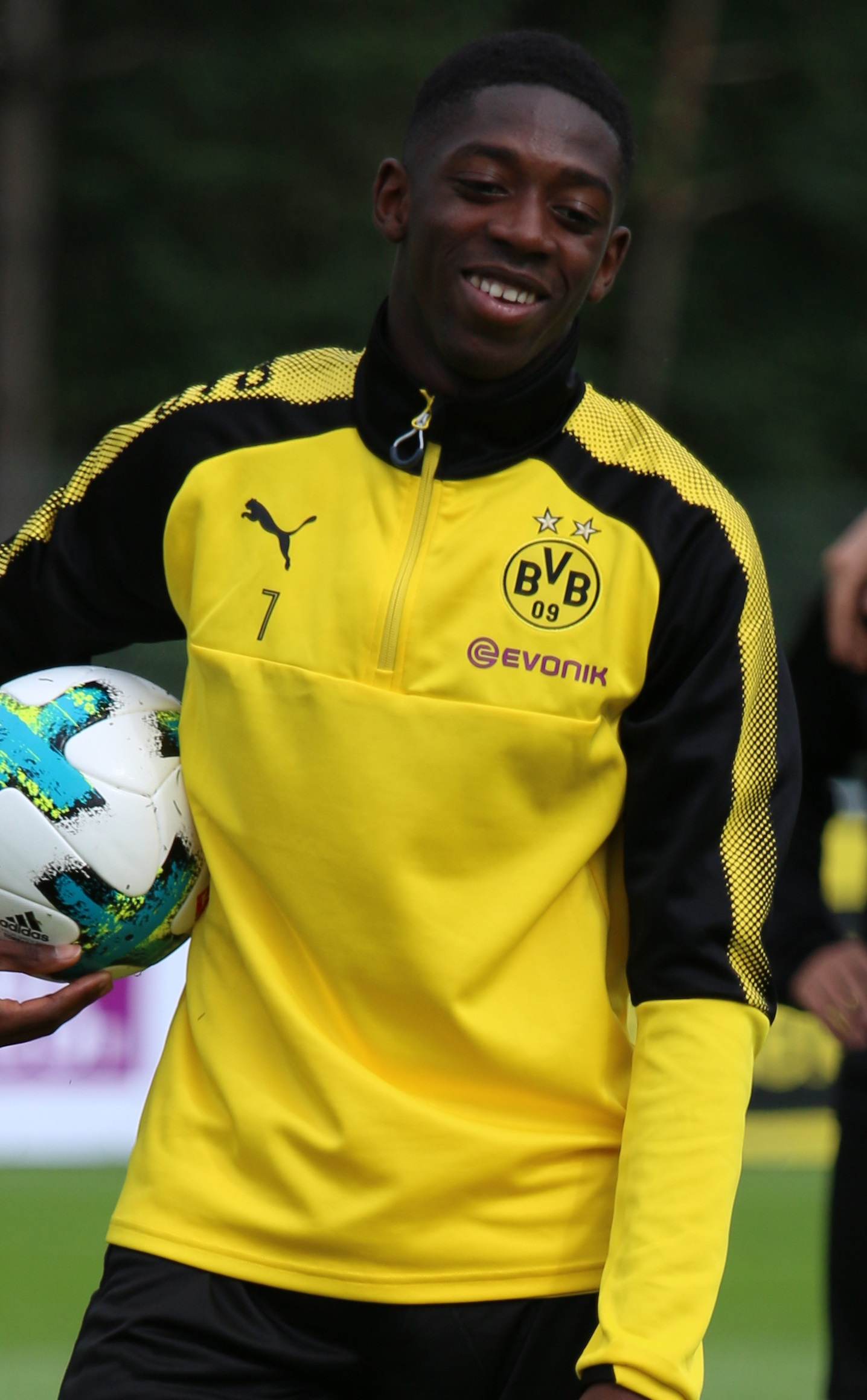 Ousmane Dembélé im BVB Trainingslager in Bad Ragaz 2017